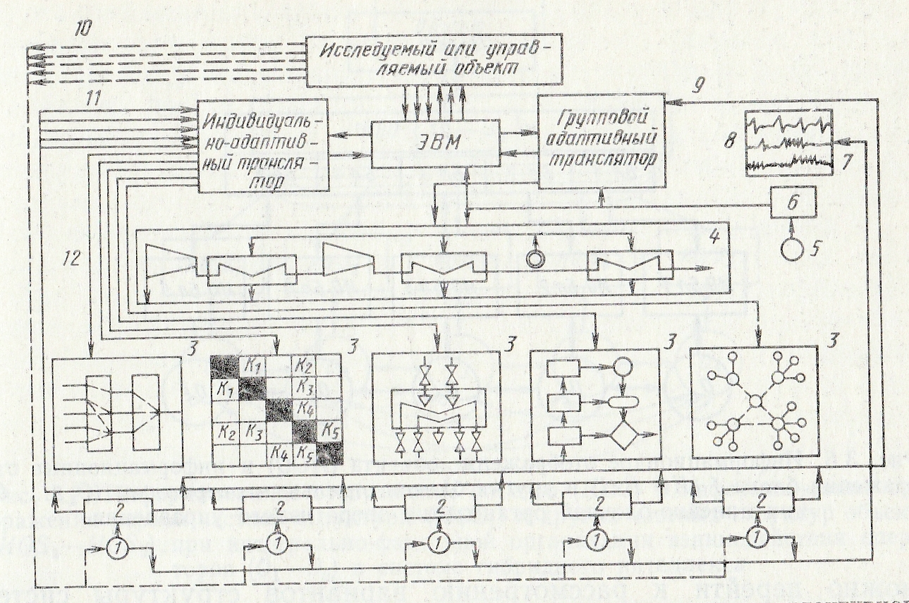 Пример структуры системы гибридного интеллекта для коллективного решения сложных задач оперативного управления.